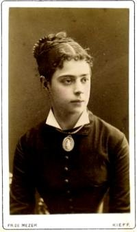 Евлалия Кадмина в Елизаветинском Институте